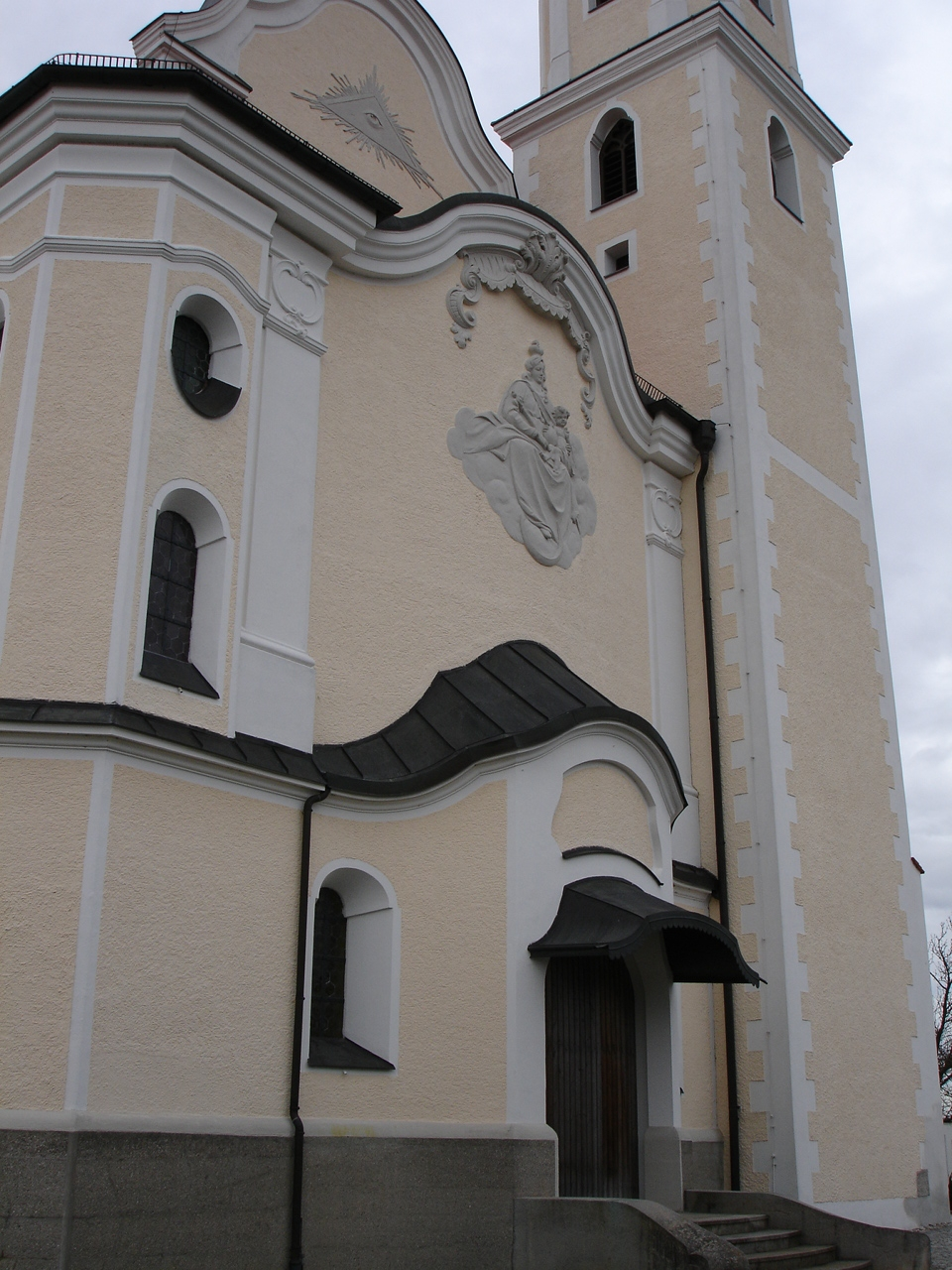 Stuckrelief-Madonna von Anton Kaindl an der Eingangsfront der Kirche St. Michael in Schönberg, Landkreis Mühldorf am Inn